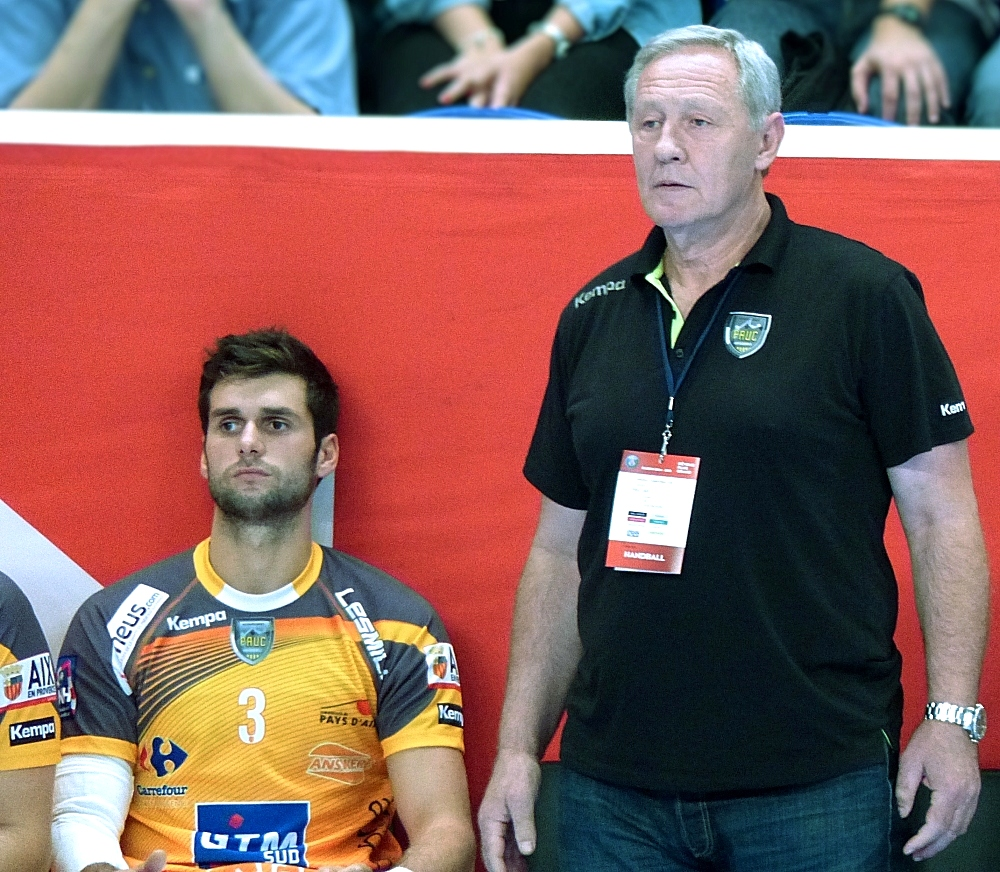 Zvonimir Serdarušić, entraîneur de l'équipe de Pays d'Aix Université Club handball lors du premier match de la saison 2014-2015 de handball de D1 avec le club aixois face au PSG Handball en ouverture de la saison 2014-2015. Ici avec Pierrick Naudin, arrière gauche. Le 11 septembre 2014 au stade Pierre de Coubertin, Paris 16e